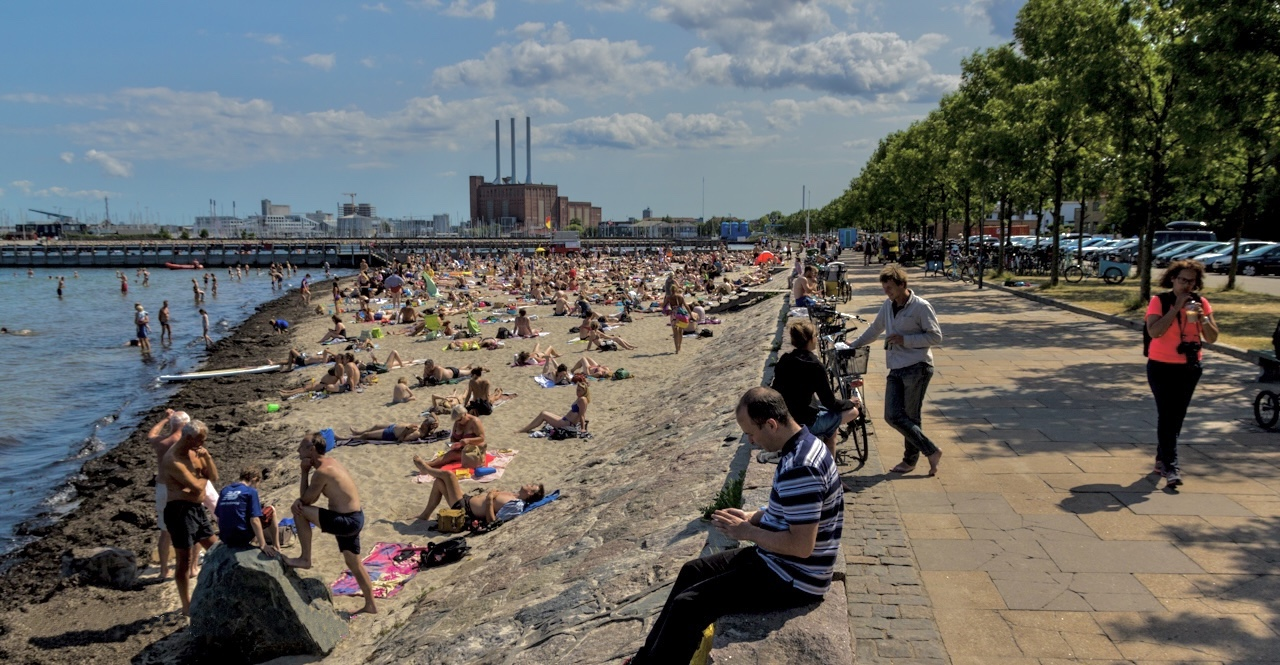 The Svanemølle Beach in Copenhagen, Denmark